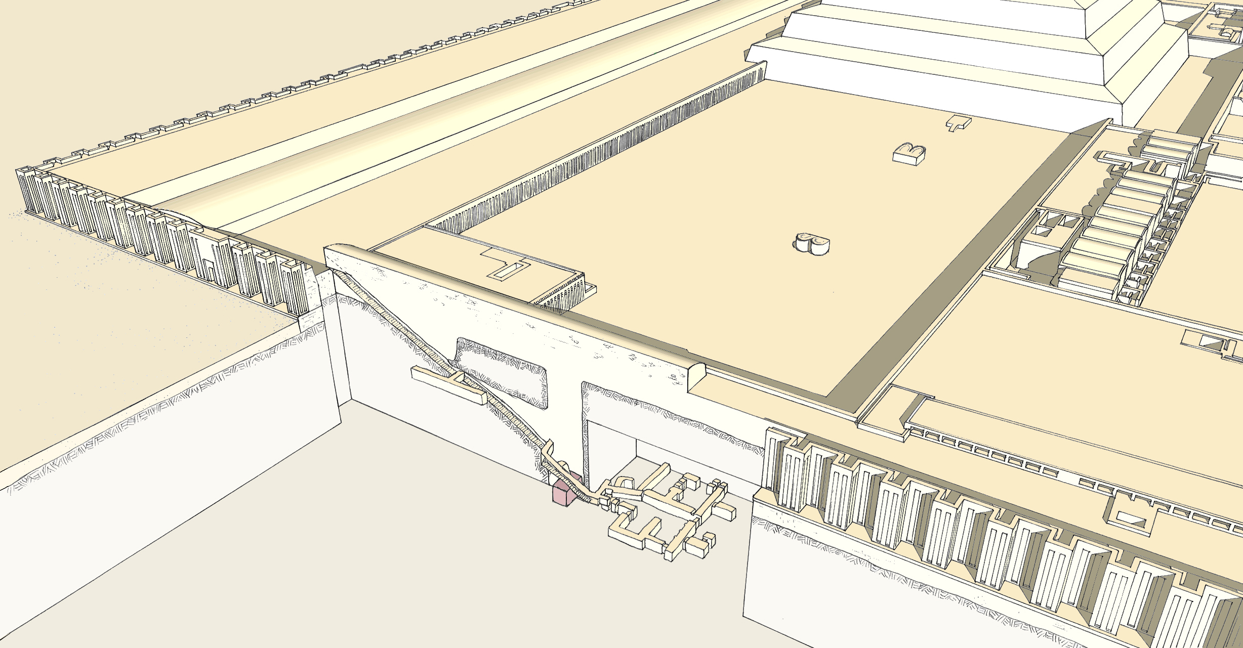 Infrastructures de la tombe sud du complexe funéraire de Djoser à Saqqarah